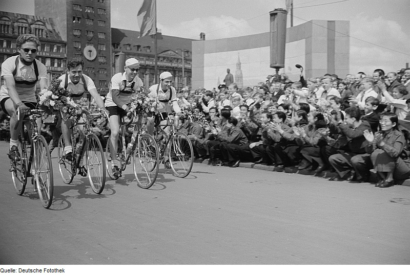 Original image description from the Deutsche Fotothek Radrennfahrer auf dem Karl-Marx-Platz (heutiger Augustusplatz)